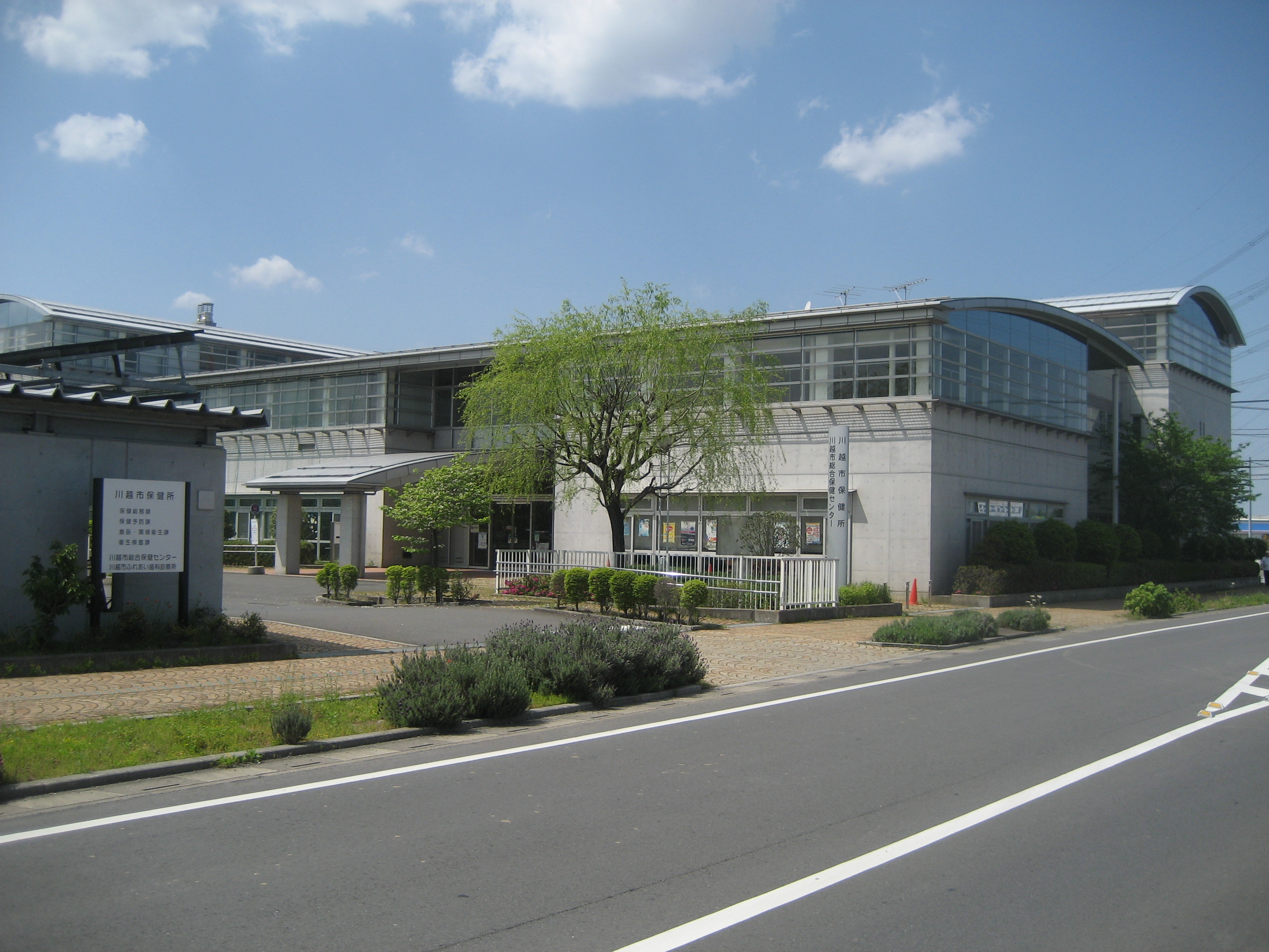 埼玉県川越市にある川越市保健所庁舎